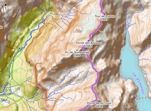 carte réalisée sur umap This map may be incomplete, and may contain errors. Don't rely solely on it for navigation.